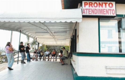 Pronto atendimento no hospital de Guaramirim/SC